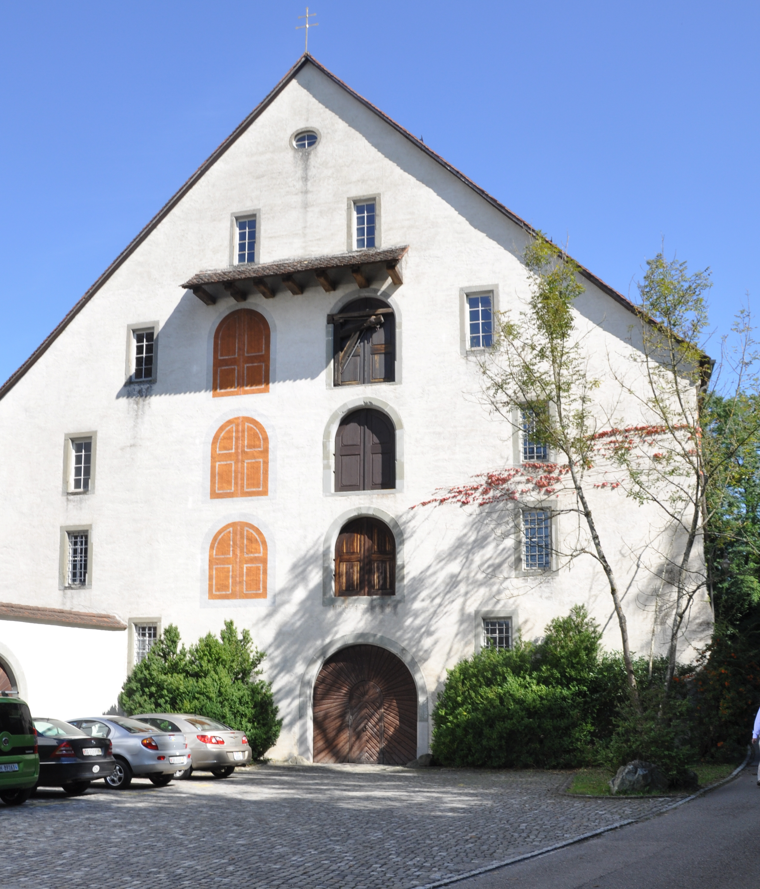 Kloster Sankt Katharinental (Diessenhofen), Kornhaus